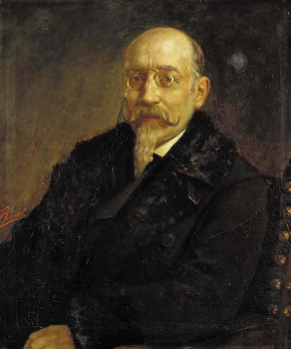 Obraz španělského spisovatele Joseho Echegaray z roku 1890 od malíře 19. století Ferdinada Rouze. Protože jsou na internetu obrazy tohoto malíře již z roku 1875, je zřejmé, že zcela určitě zemřel před více než 70ti lety.